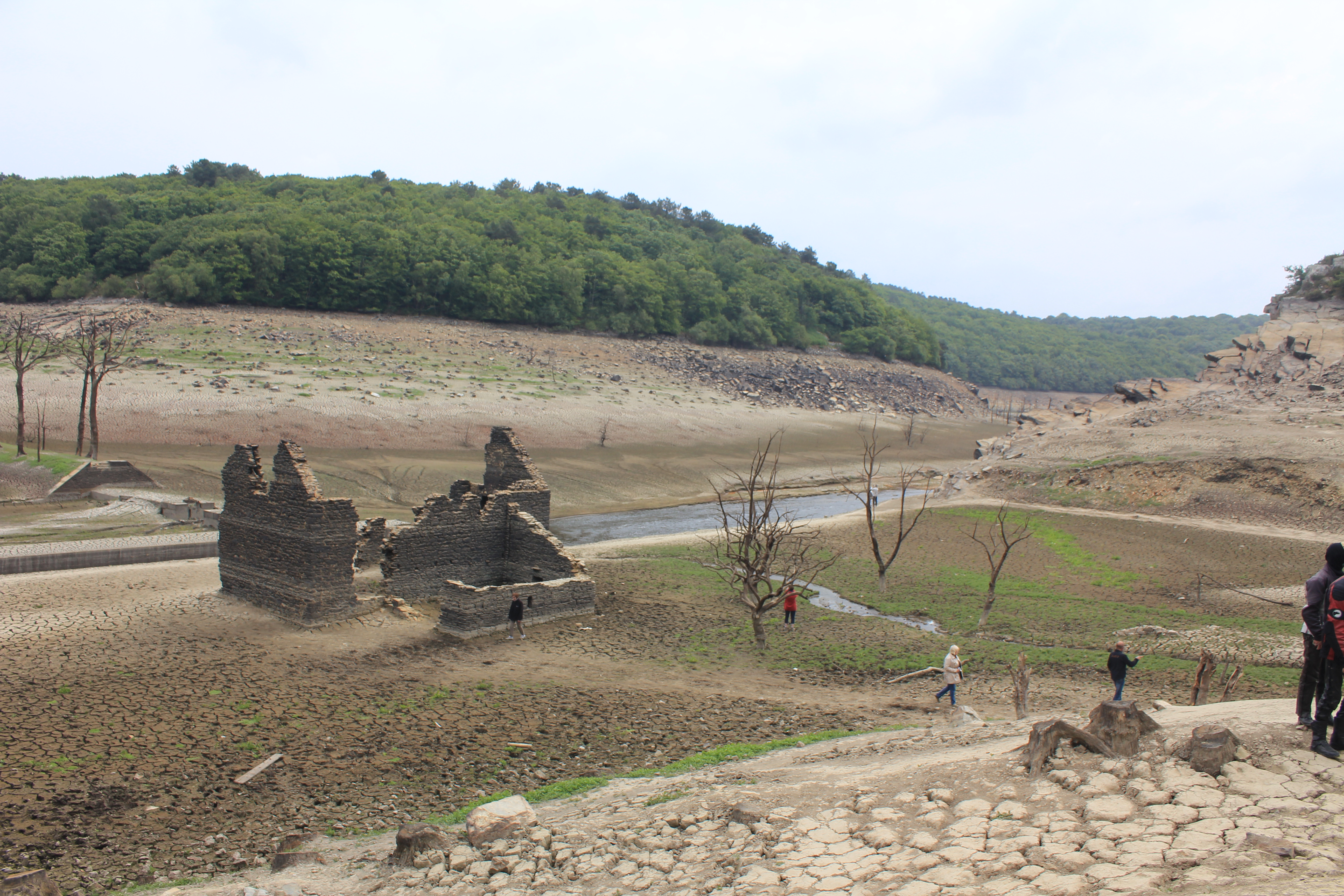 lac de Guerlédan lors de sa vidange de 2015